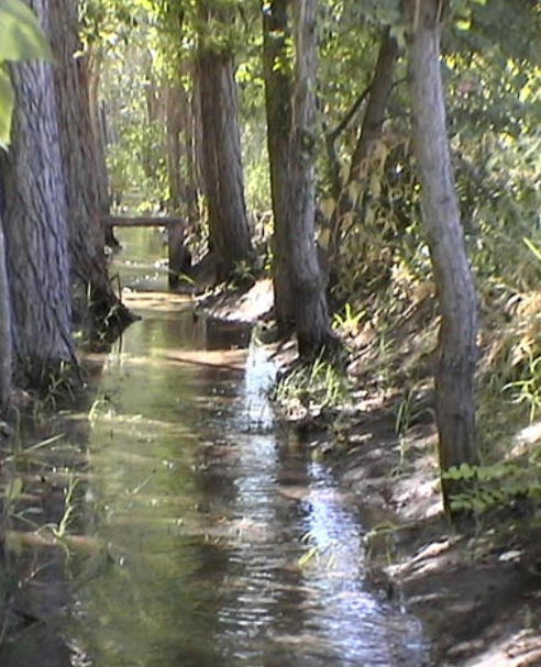 Centro Teosófico de San Rafael, Mendoza